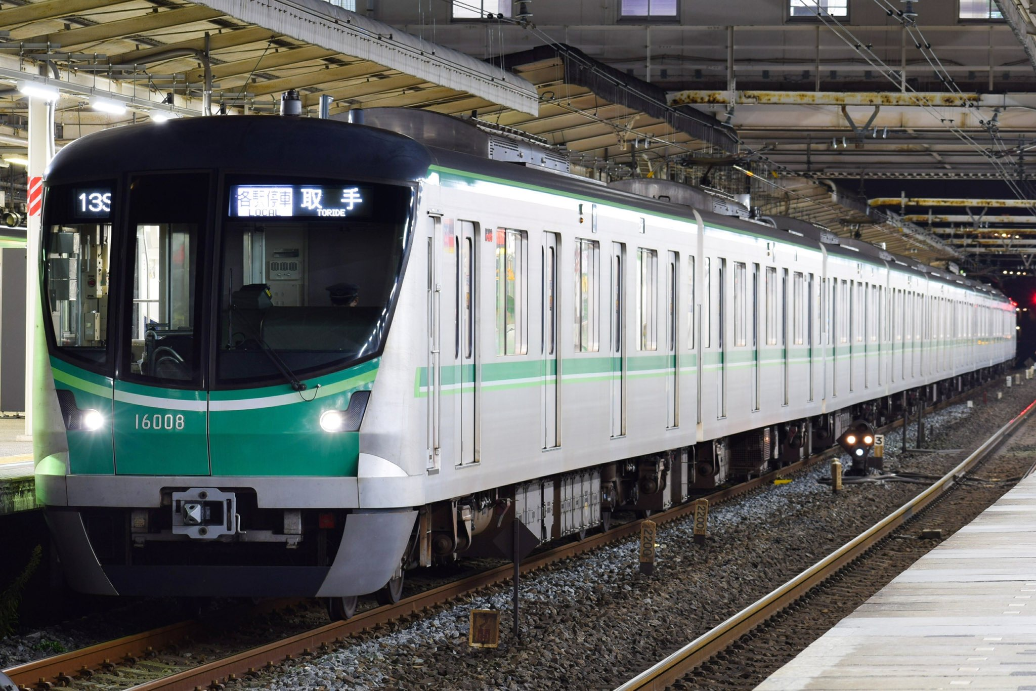 我孫子駅に停車中の取手行メトロ車